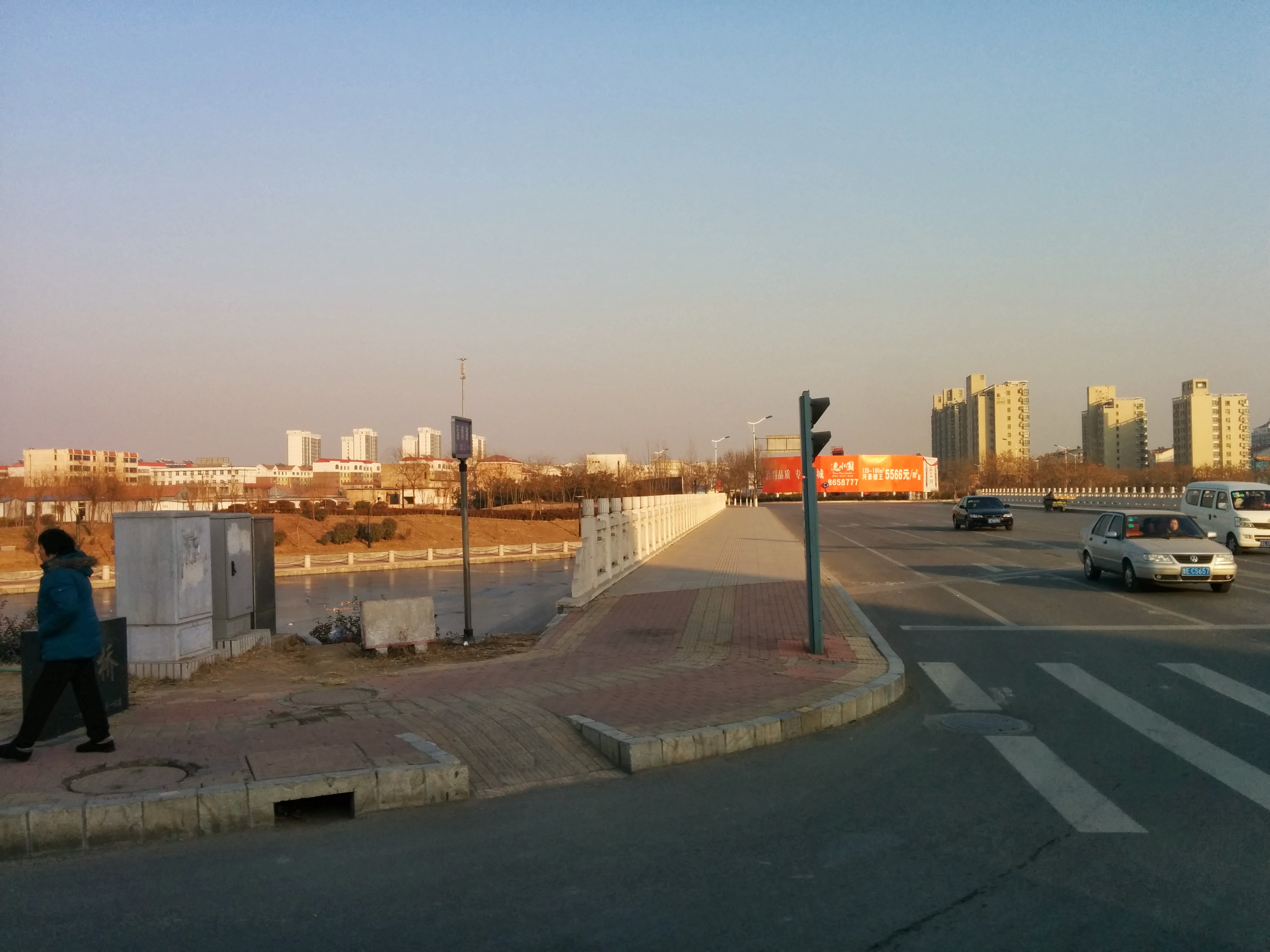 Dongying, Shandong, China